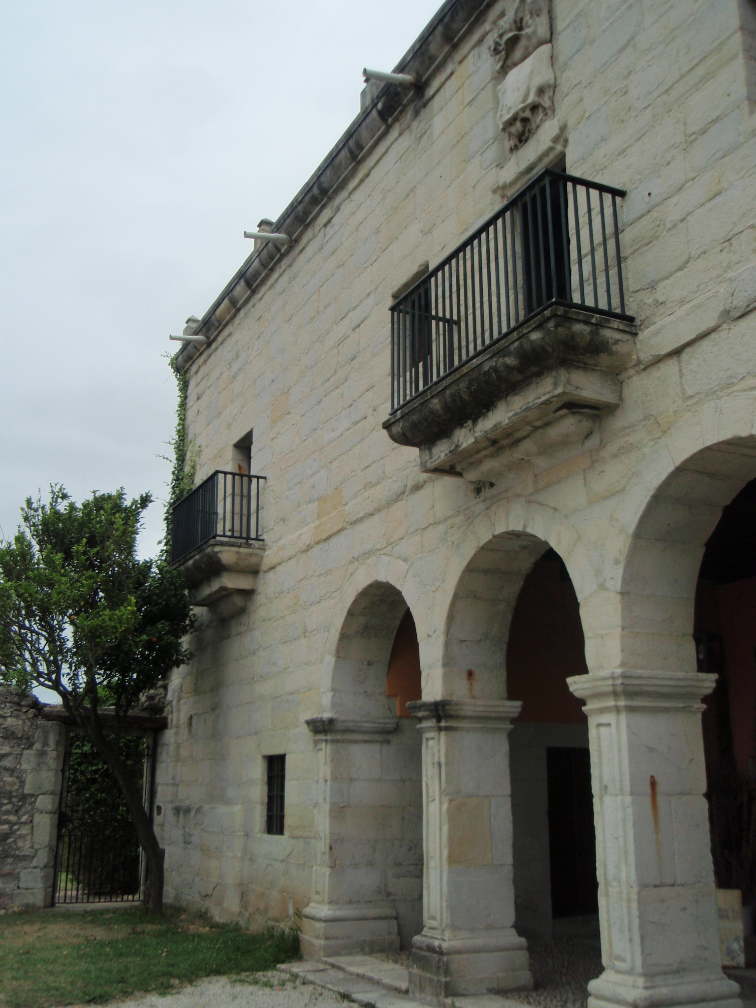 Vista de la fachada sur del Palacio de Peredo en Viveda.